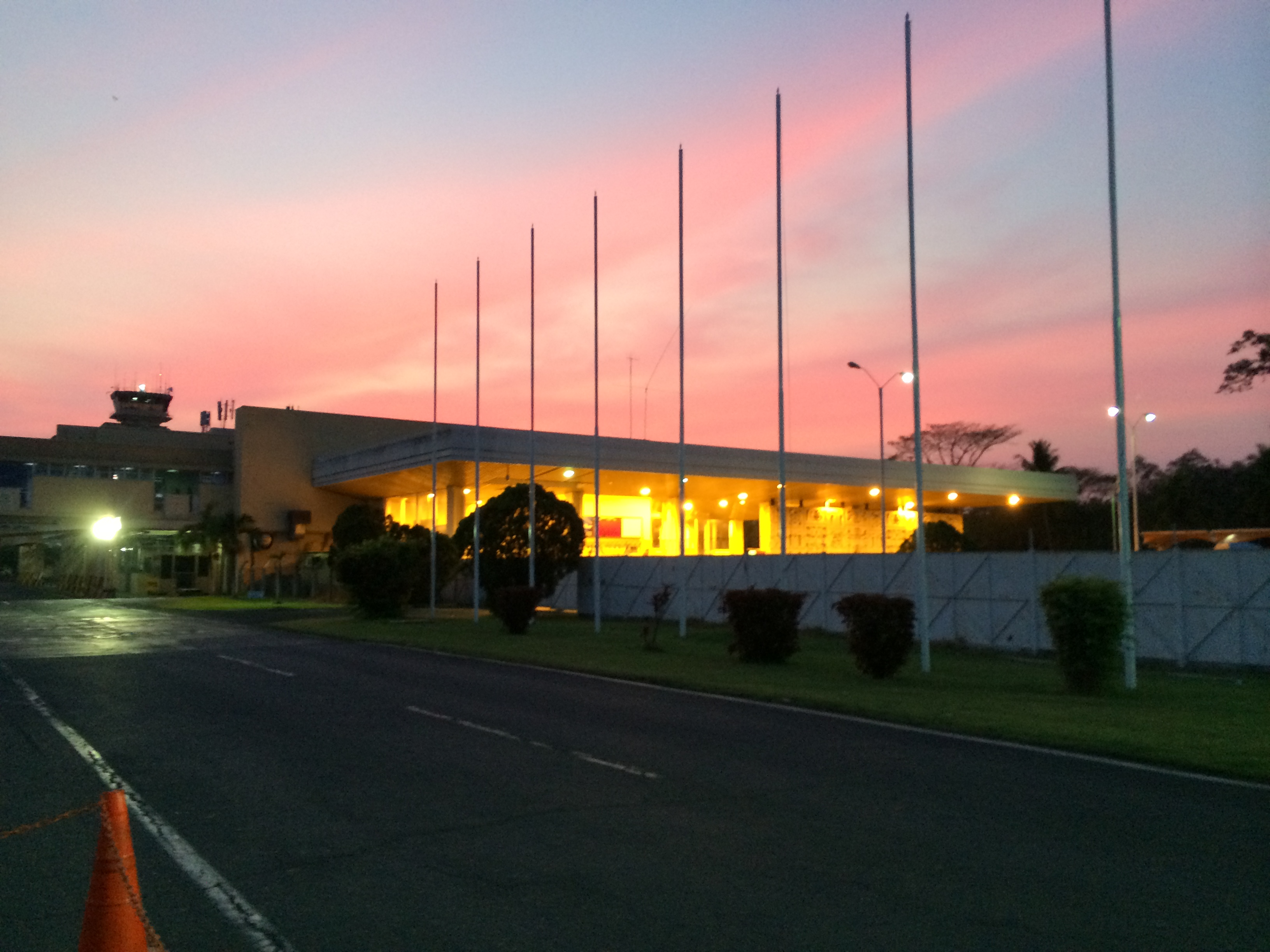 Aeropuerto Internacional de El Salvador al atardecer.